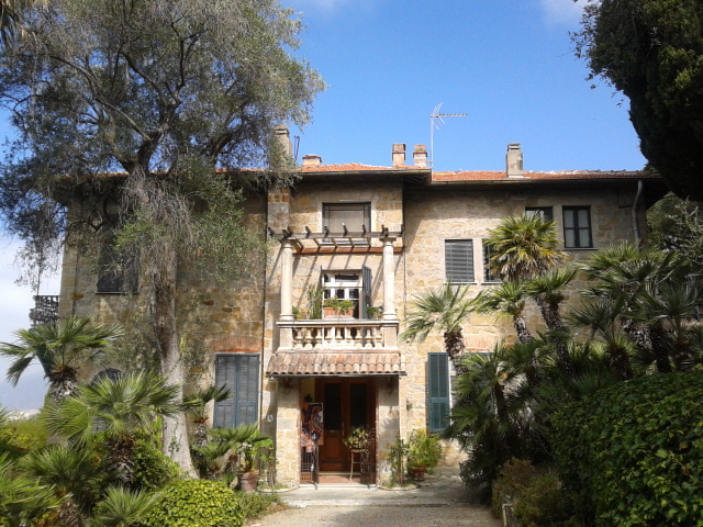 Immagine della facciata di Villa Mariani a Bordighera